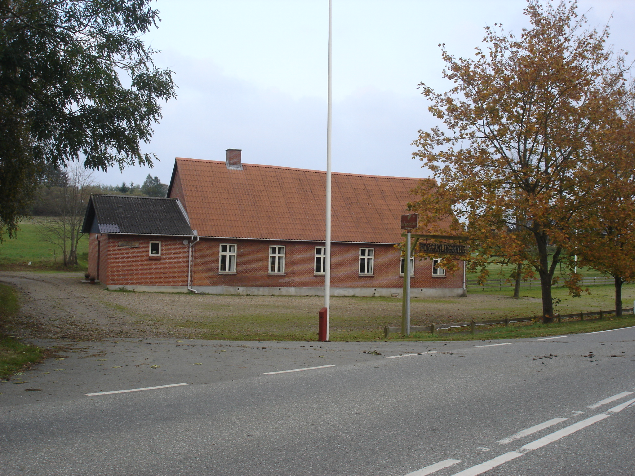 Tovstrup Forsamlingshus